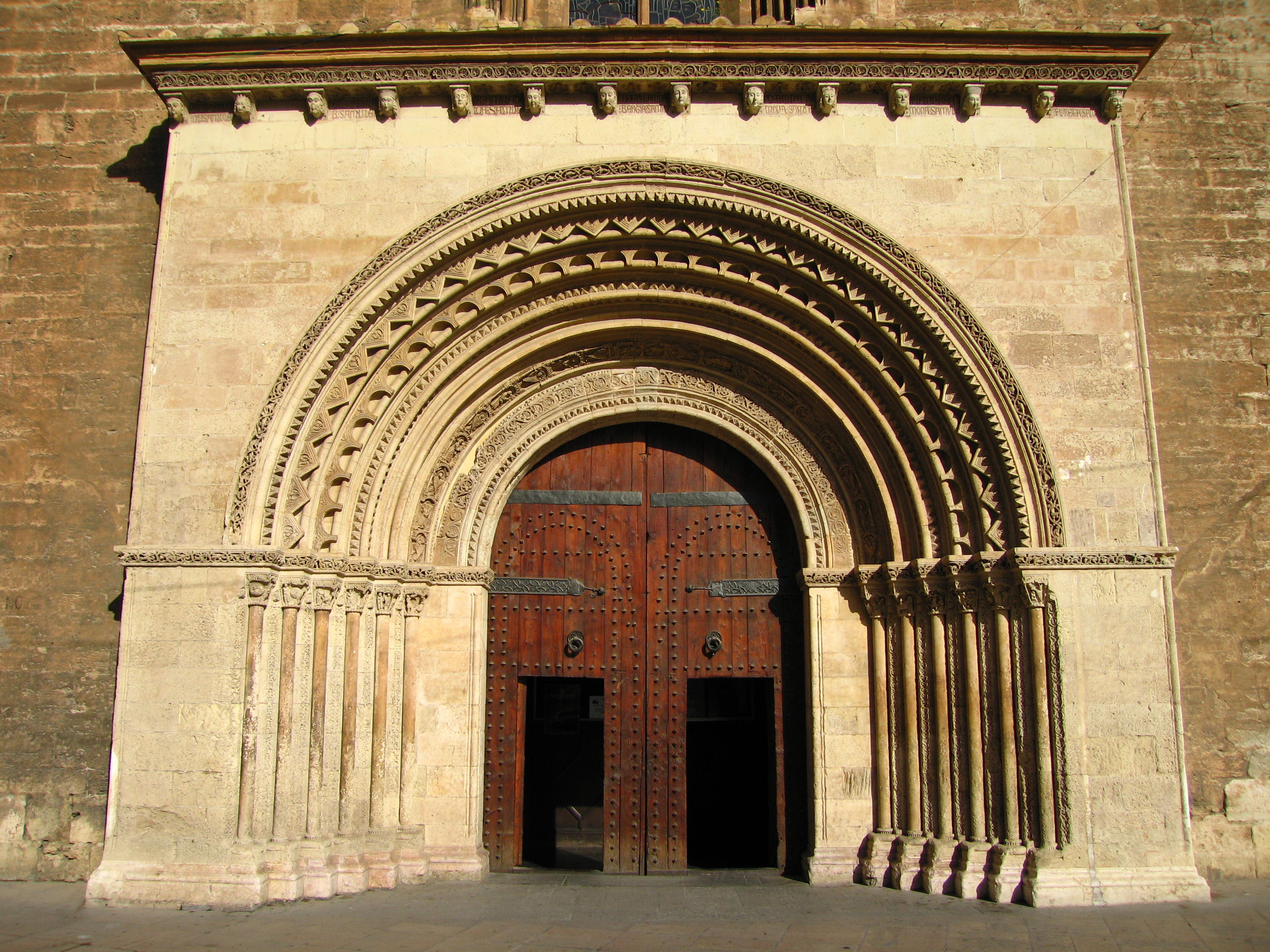 porta almoina (seu de València)